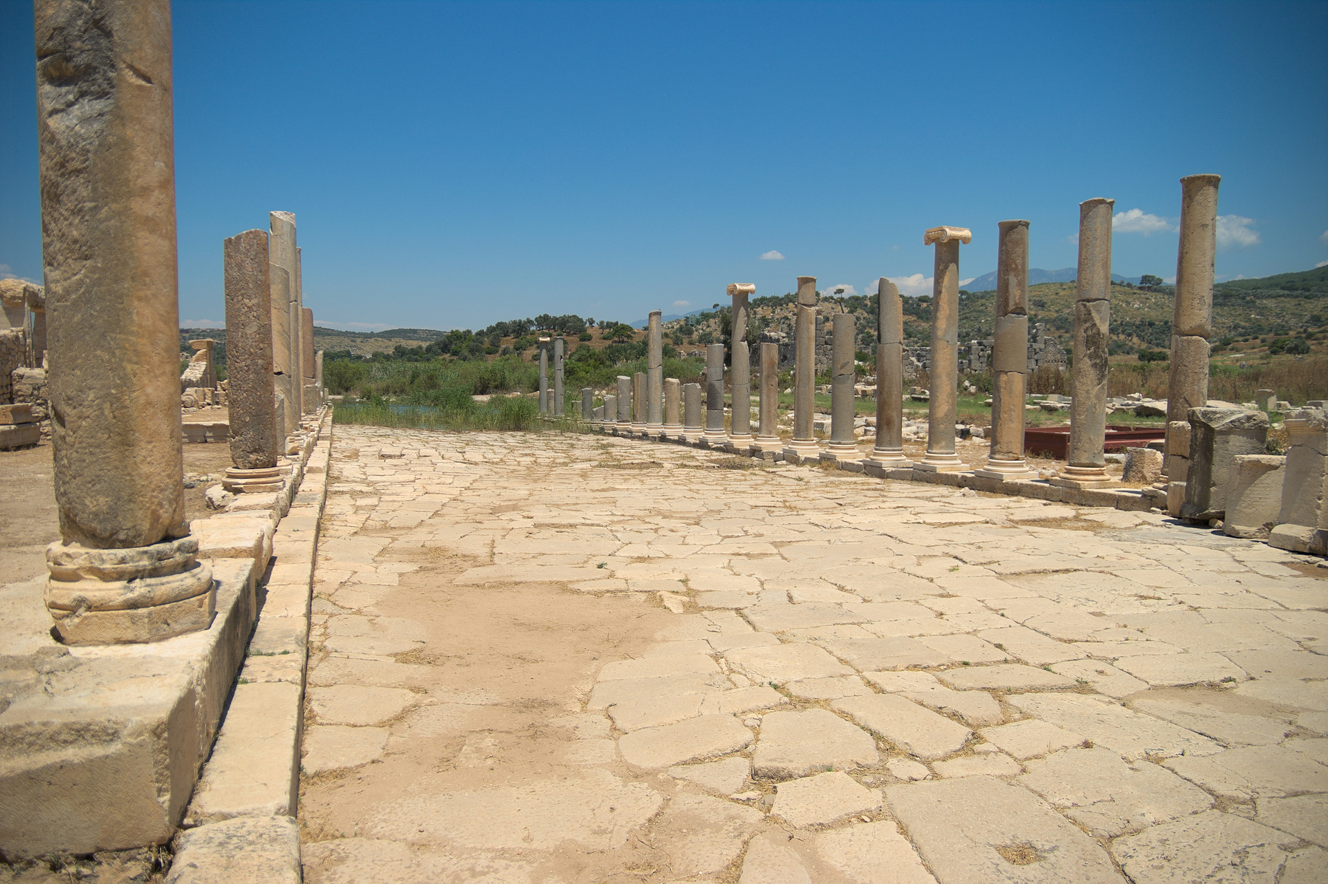 Патара. Центральная улица 3